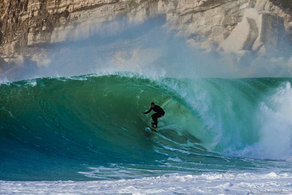 2016.12_Nazaré